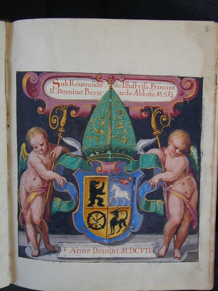 Titelblatt des Codex 1335 der Stiftsbibliothek St.Gallen.